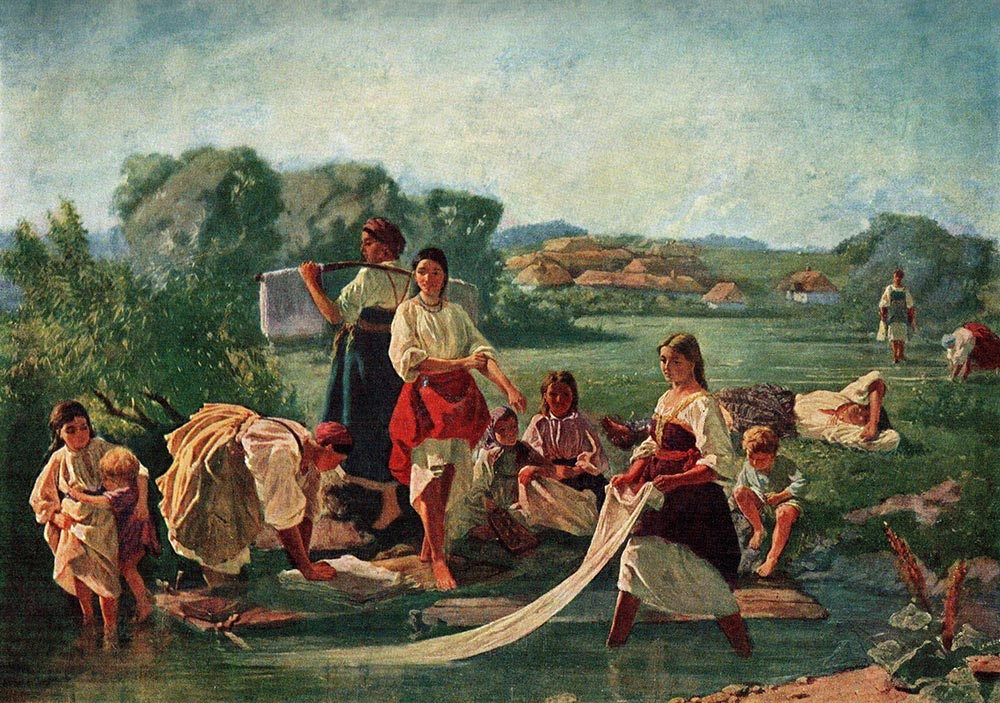 Трутовский, Константин Александрович (1826—1893). Белят полотно. Национальный художественный музей Украины, Киев